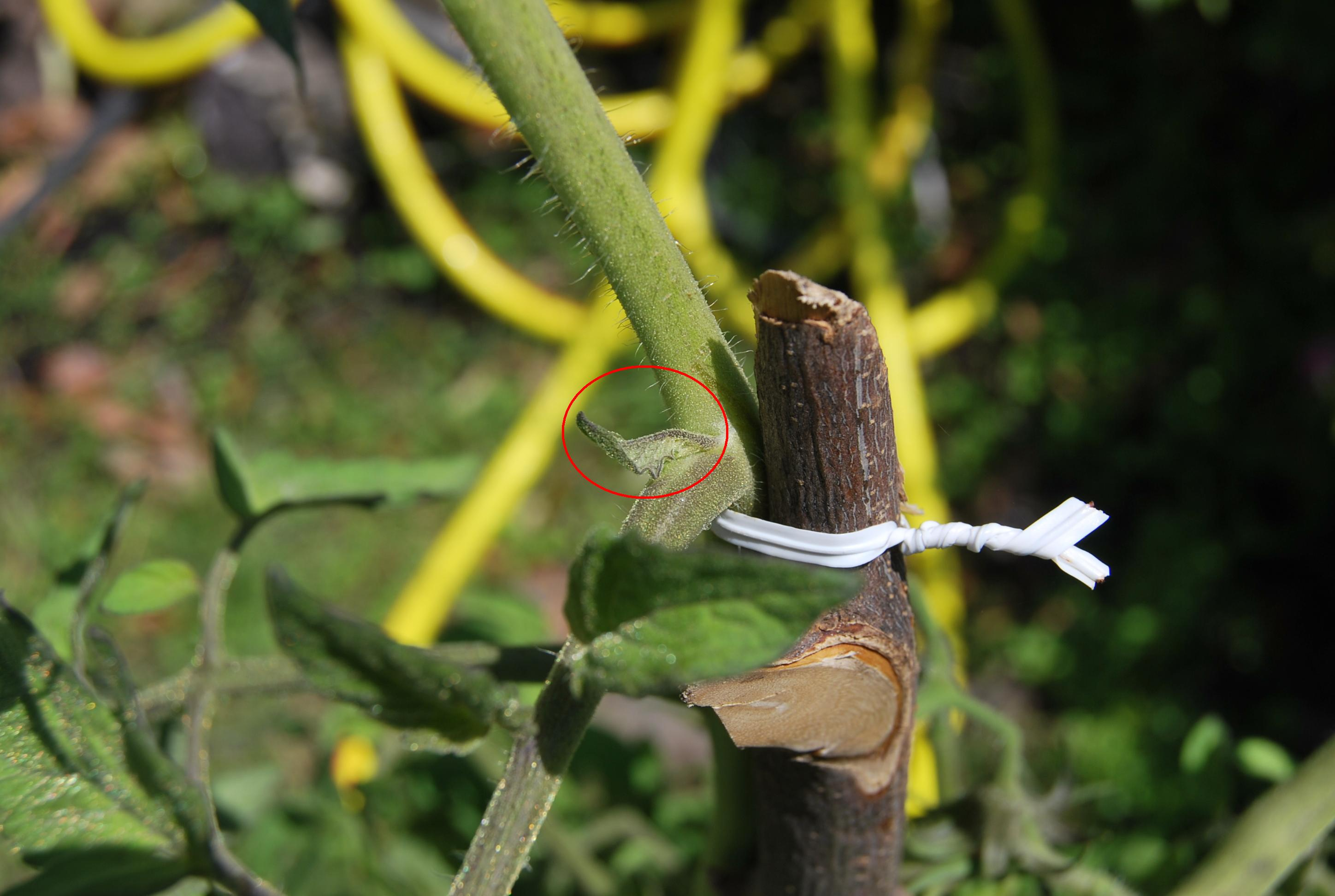 Un "Germoglio ascellare" di un pomodoro